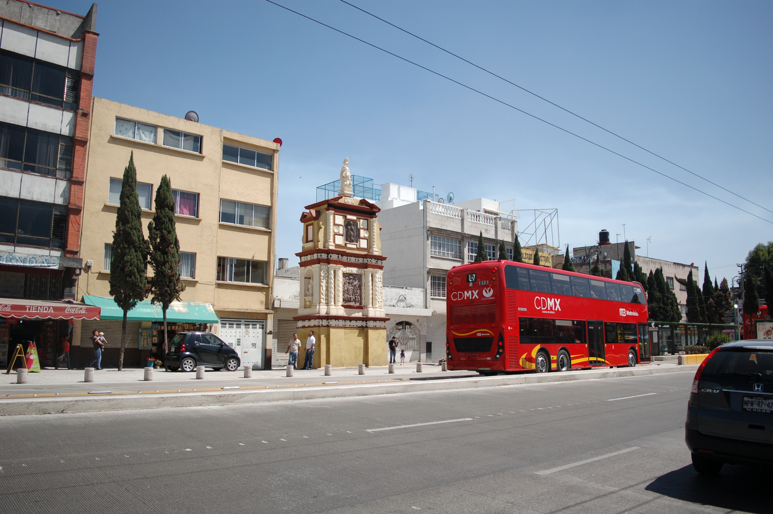 Metrobús en Calzada de los Misterios